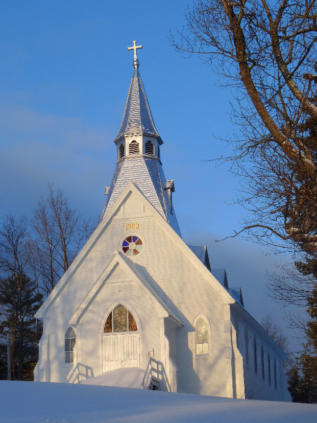 L'église Holy Trinity de Maple Grove dans la municipalité d'Irlande en Chaudière-Appalaches (Québec). Elle a été constuite entre 1900 et 1902. Elle a été citée monument historique en 2003.